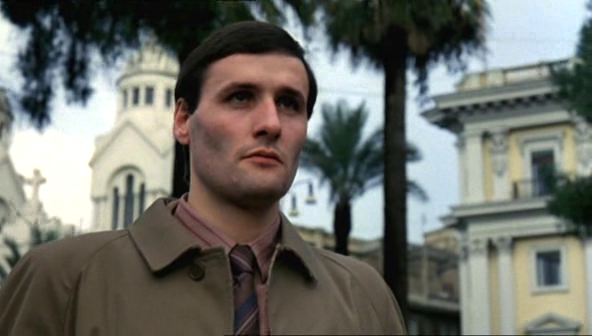 screenshot del film Il caso Moro diretto da Giuseppe Ferrara